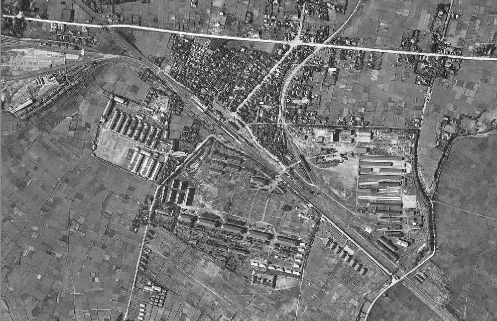 アメリカ軍による津田沼駅周辺の空撮